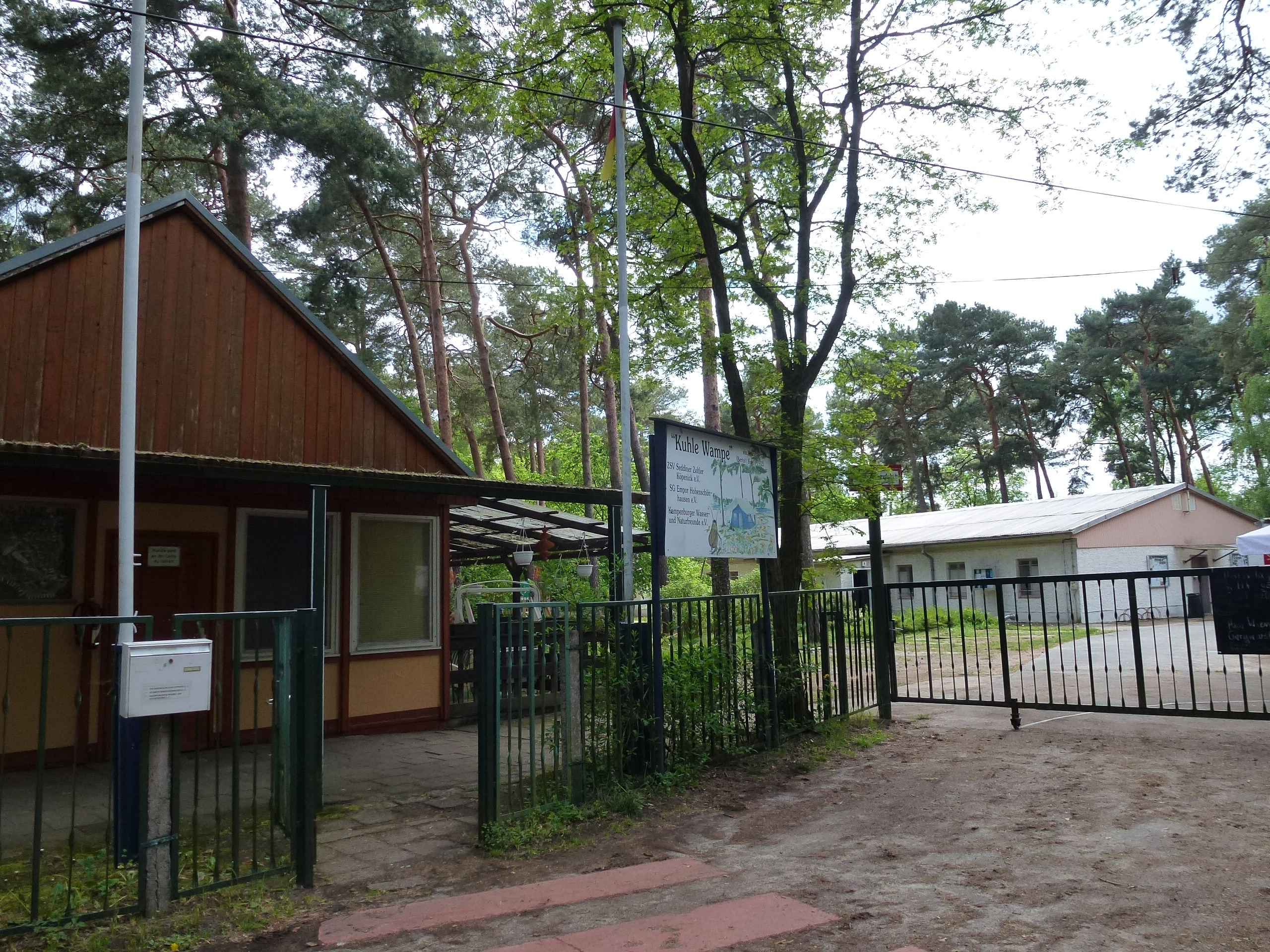 Berlin-Müggelheim Straße zur Krampenburg Zeltplatz Kuhle Wampe